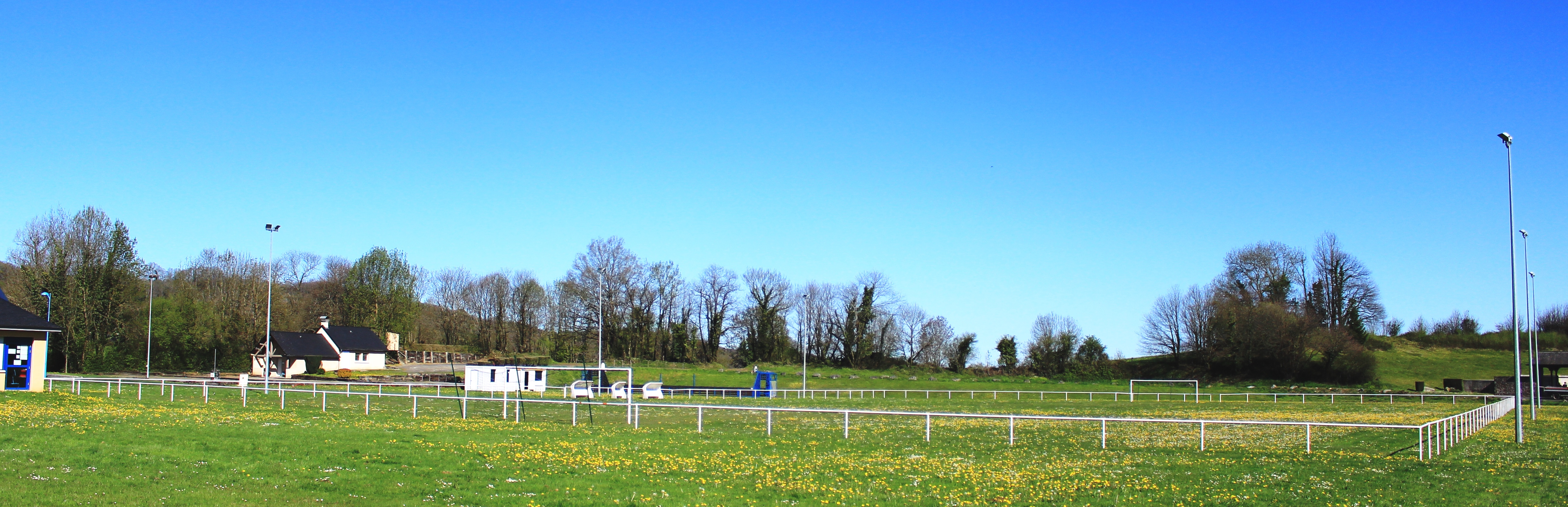 Stade de football de Poueyferré (Hautes-Pyrénées)